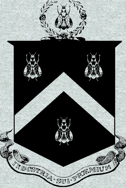 Den norske Sewell slektens våpen.